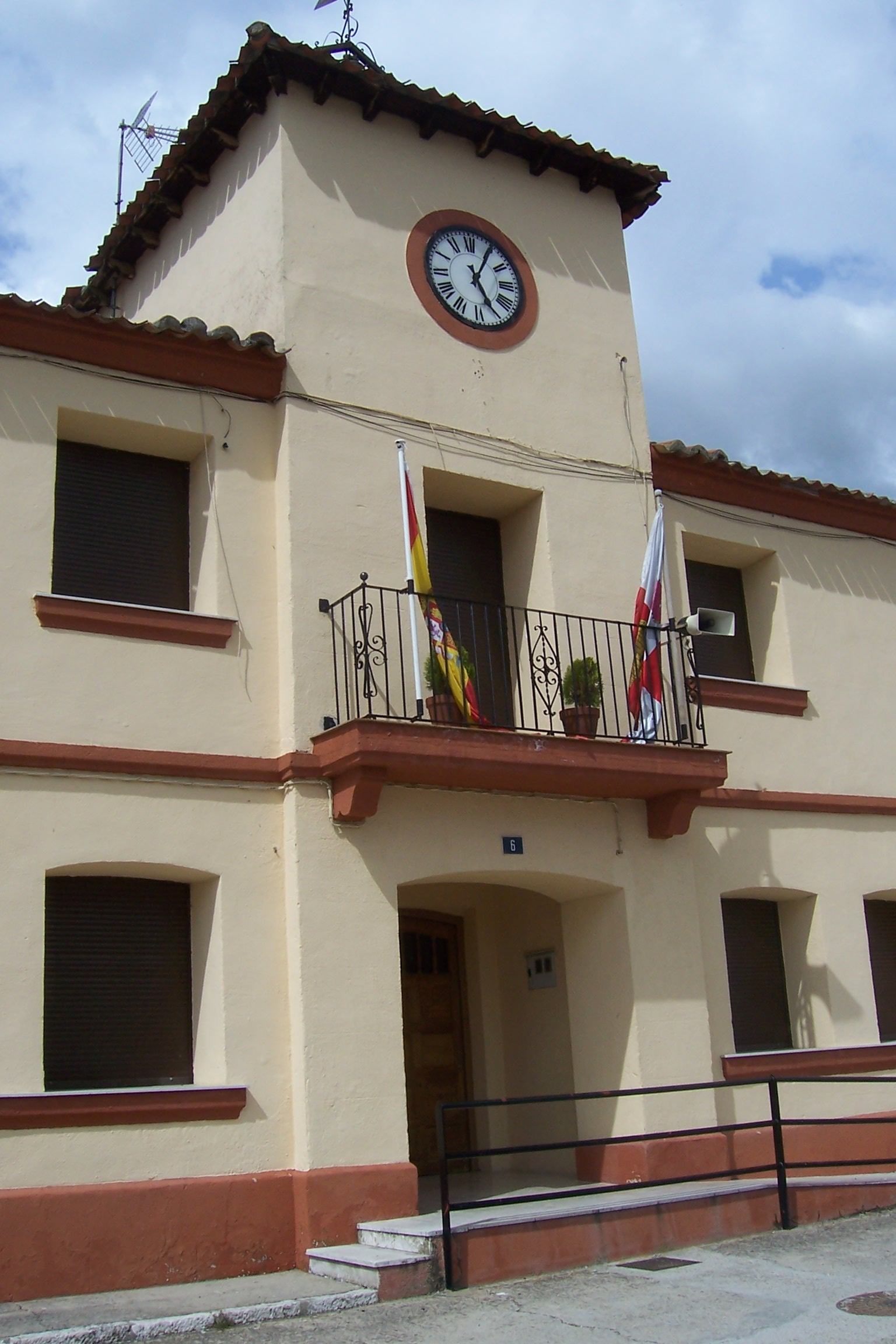 Ayuntamiento del municipio español de Sacramenia en la provincia de Segovia.